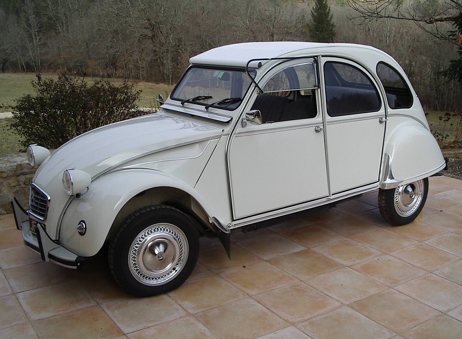 2cv6 n° de série AZKA372168